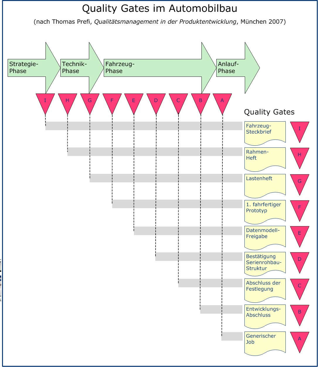 Quality Gates im Automobilbau; Daimler-Chrysler, 1990er Jahre. Nach Thomas Prefi: Qualitätsmanagement in der Produktentwicklung, in: Tilo Pfeifer, Robert Schmitt (Hrsg.): Masing Handbuch Qualitätsmanagement, 5. Aufl., S. 418